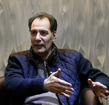 بهنام تشکر